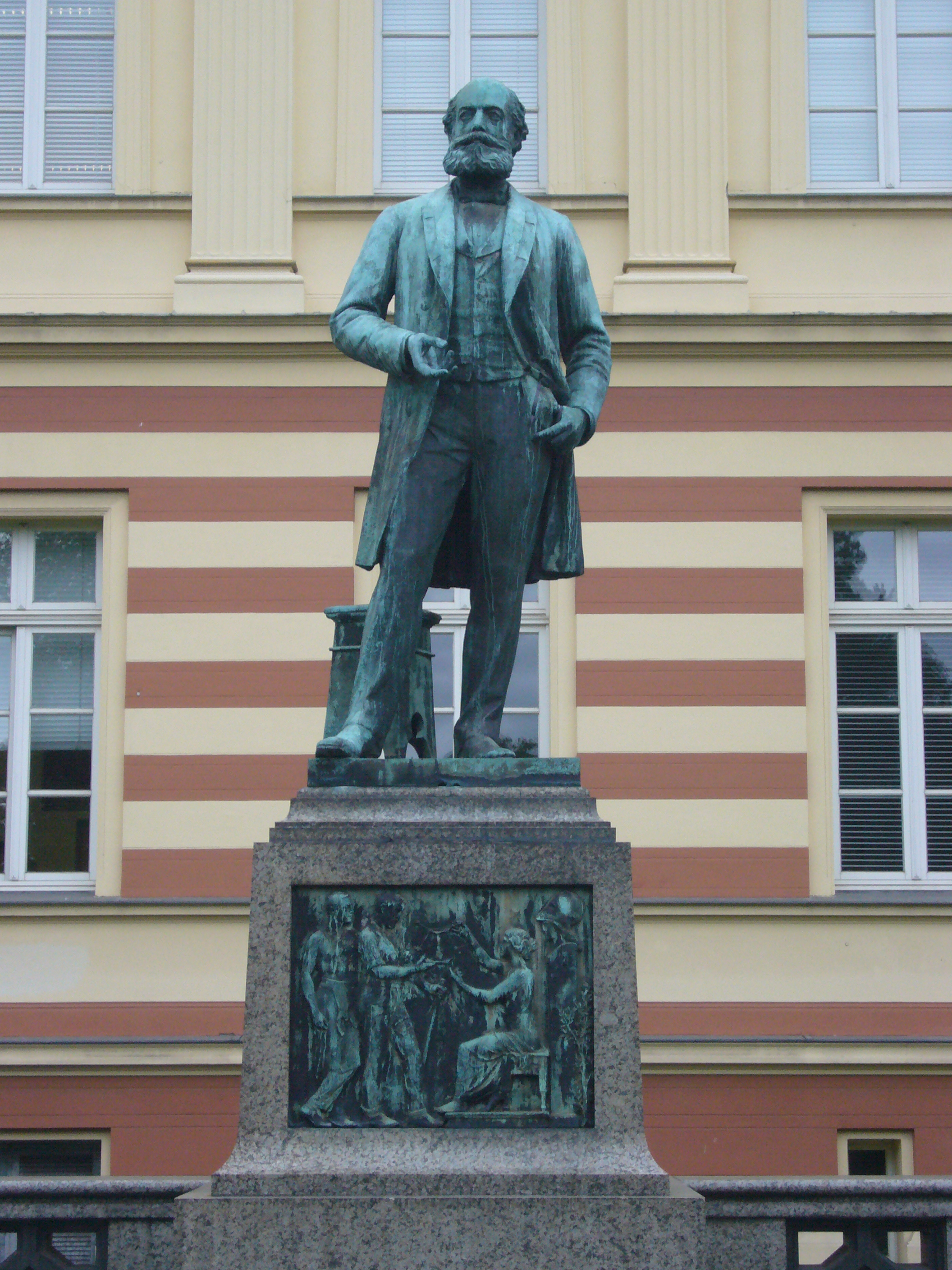 Denkmal für August Kekulé in Bonn, Ortsteil Poppelsdorf